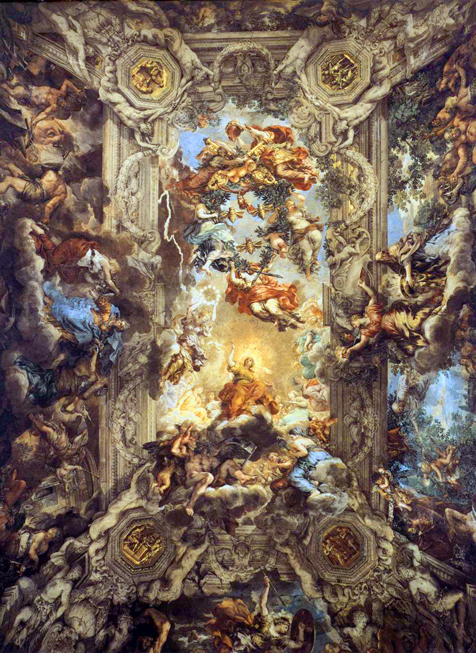 The Triumph of Divine Providence (La divina provvidenza), FrescoPalazzo Barberini, Rome.